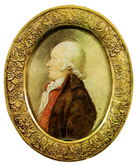 Андреевич Иванович Толстой (1721—1803) - внук П.А. Толстого, прадед Л.Н. Толстого.